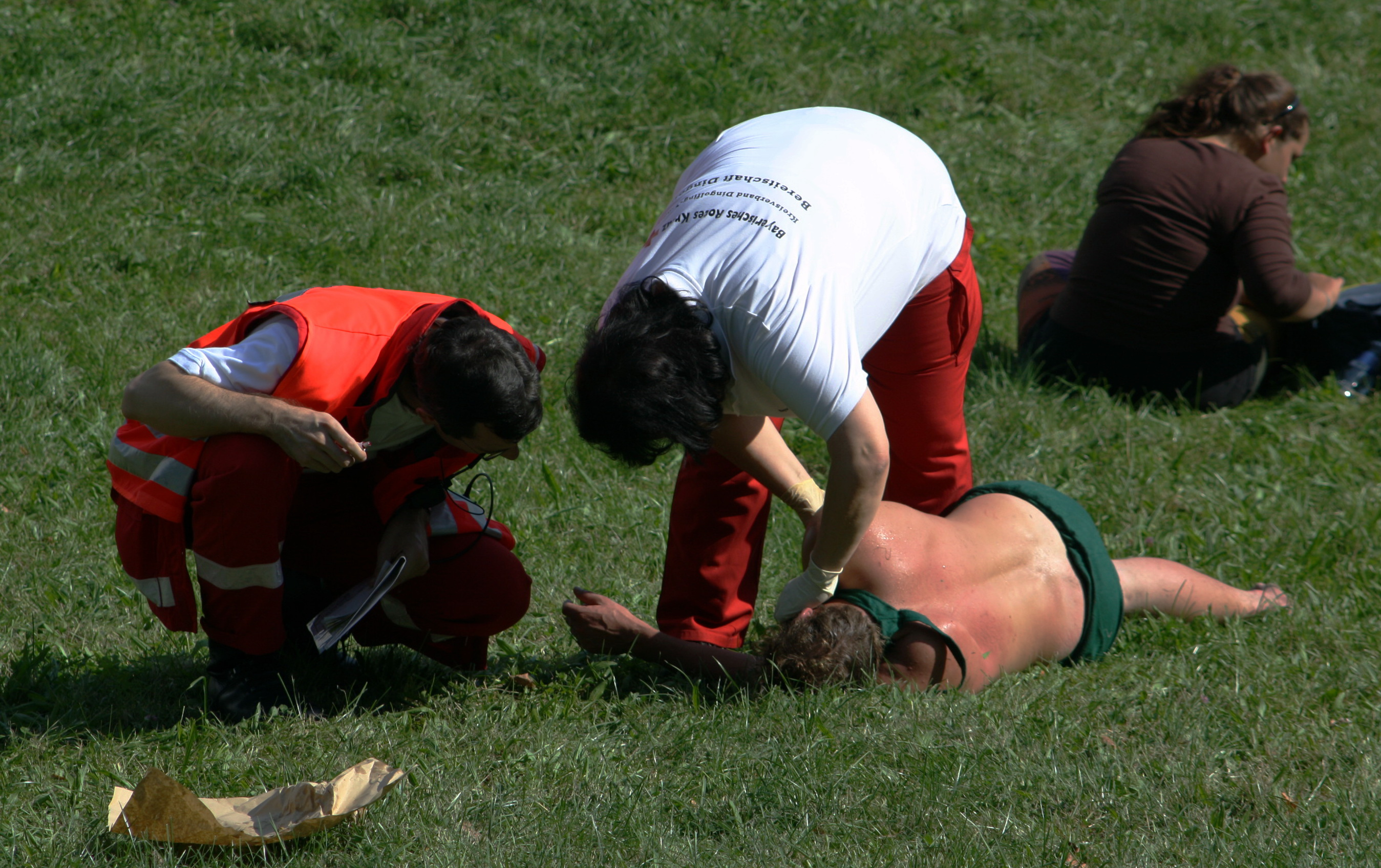 Vom Alkohol bewusstloser Mann wird vom Bayrischen Roten Kreuz versorgt. Mann liegt am Rande der Theresienwiese. Erster Tag des Oktoberfestes.